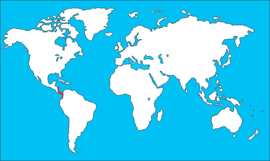 Ara ambigua elterjedési területe